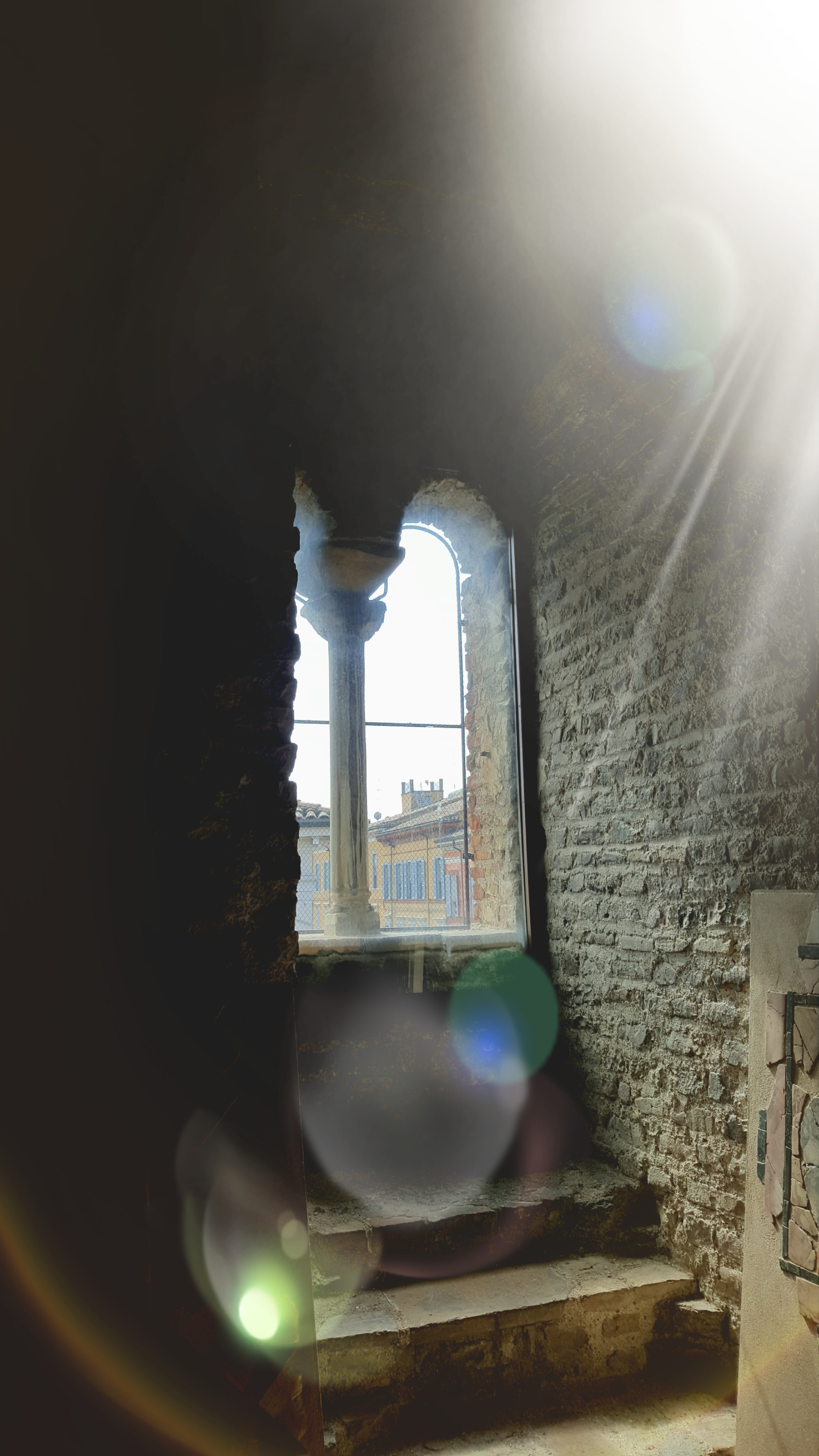 finestra del piano superiore This is a photo of a monument which is part of cultural heritage of Italy.